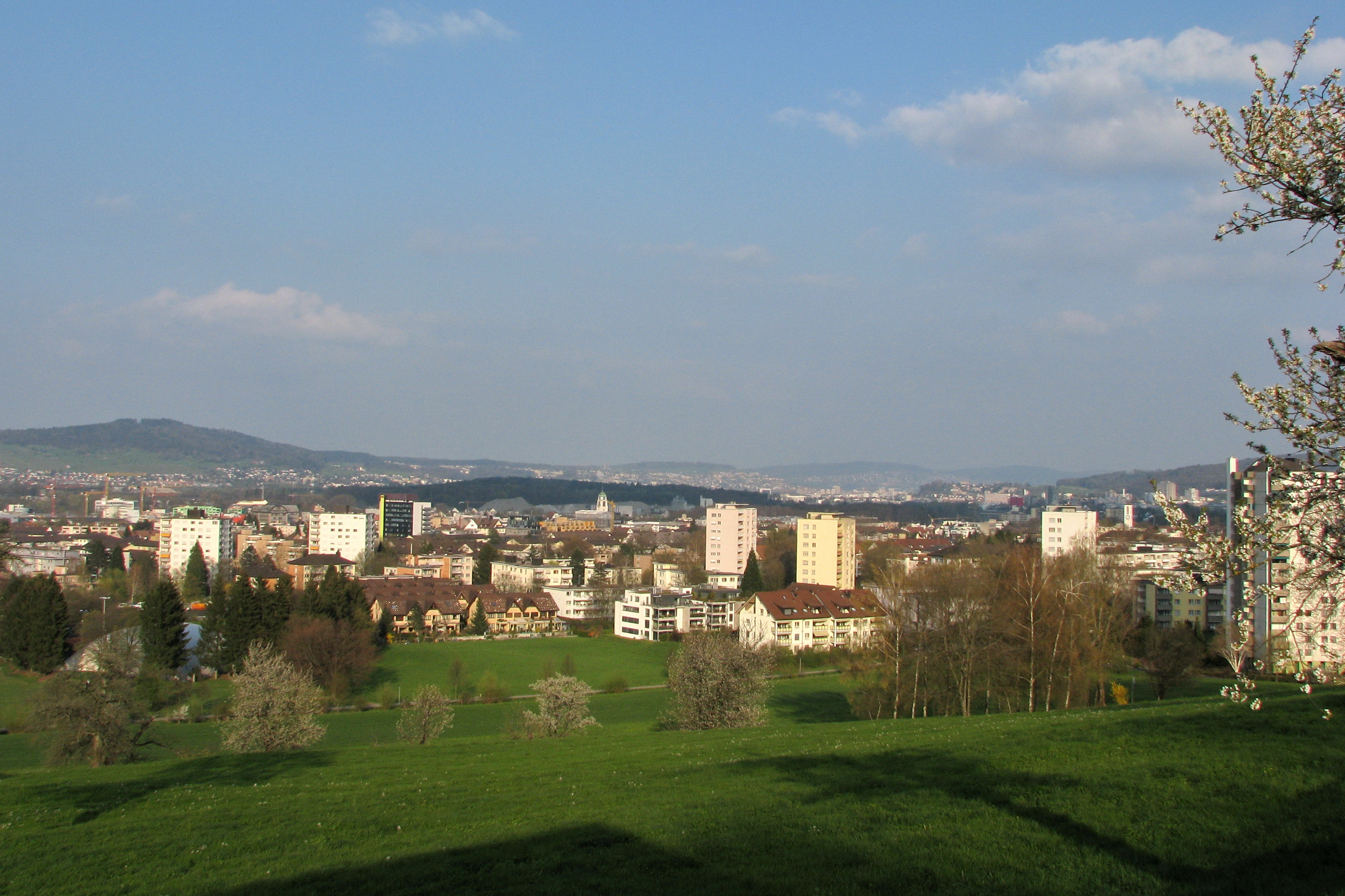 Dietikon (Switzerland), as seen from Grunschen, Limmattal in the background.